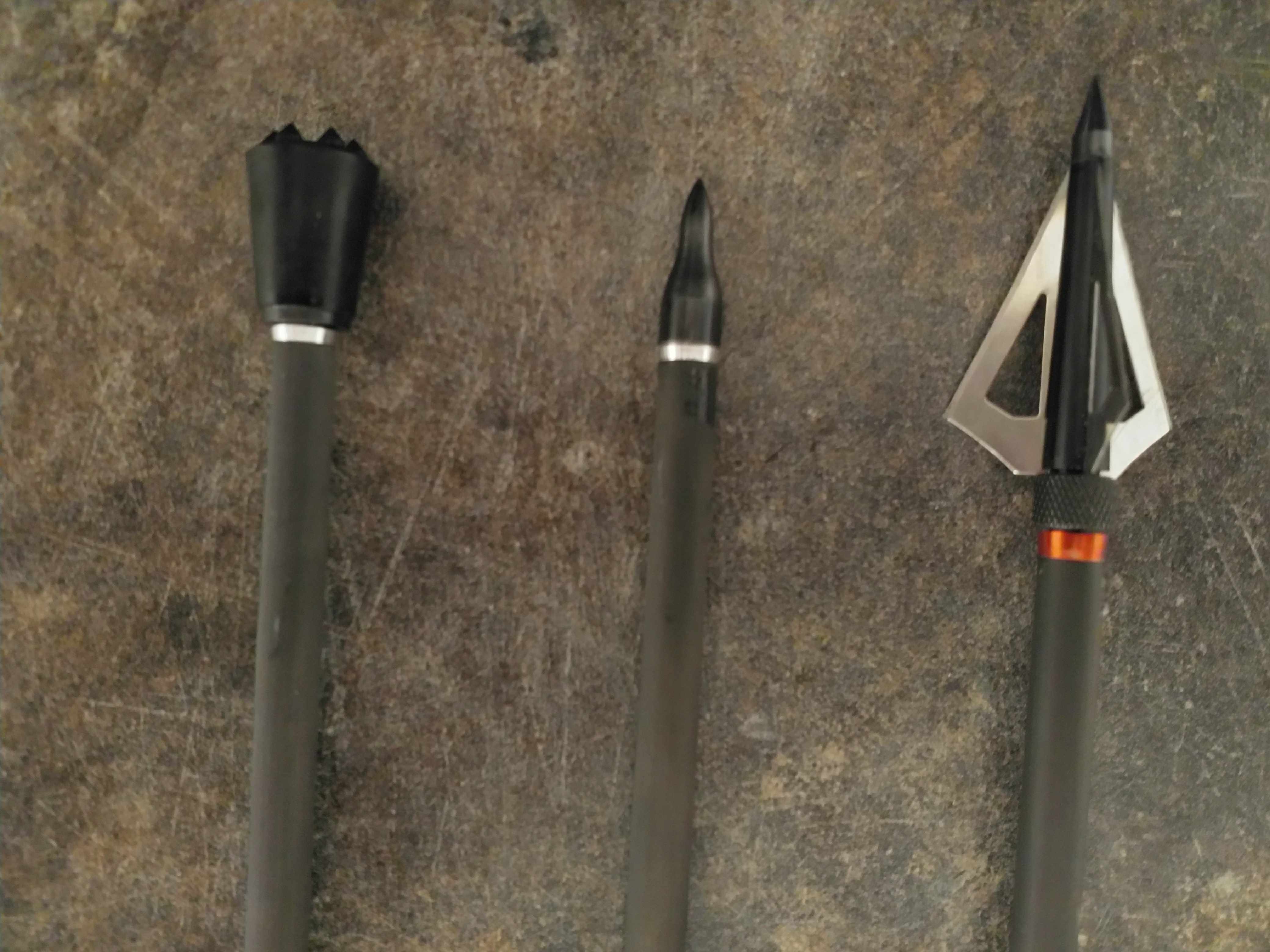 Erityyppisiä jousiammuntaan tarkoitettuja nuolenkärkiä. Vasemmalla bluntti, keskellä tauluammuntaan tarkoitettu nuolen kärki ja oikealla metsästyskärki.